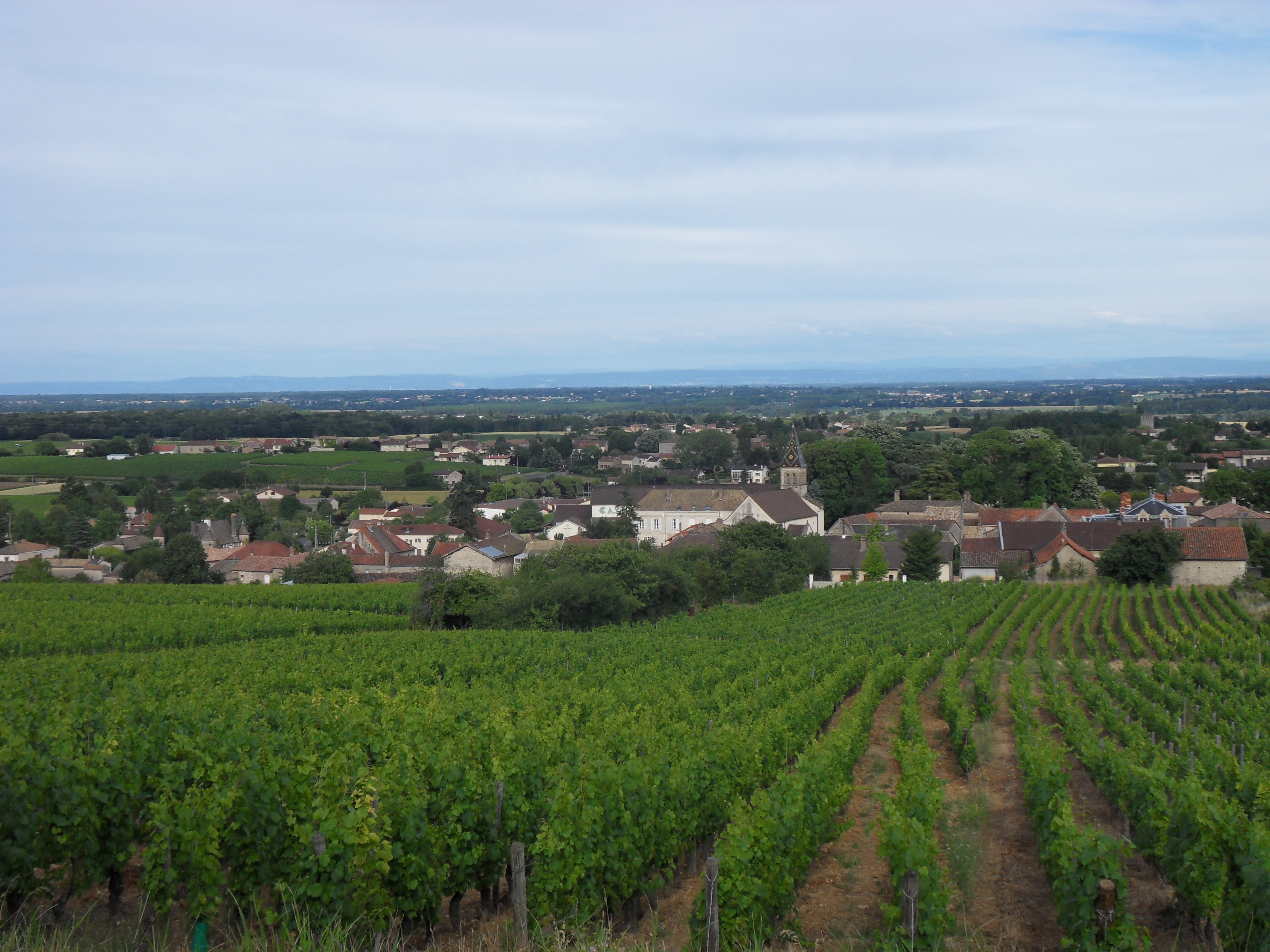 Commune de Viré (Saône-et-Loire)